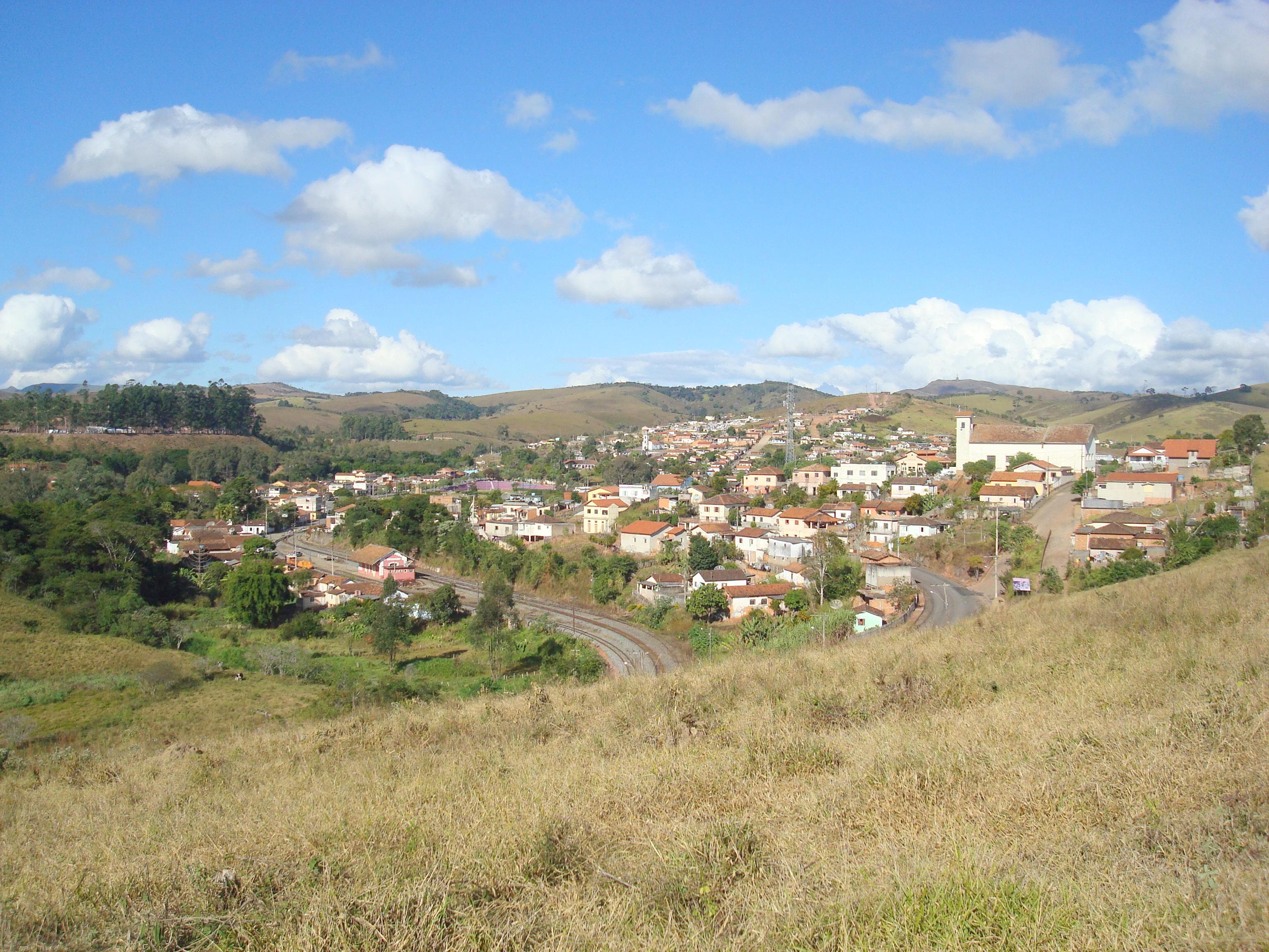 Vista Panorâmica de Arantina - Minas Gerais